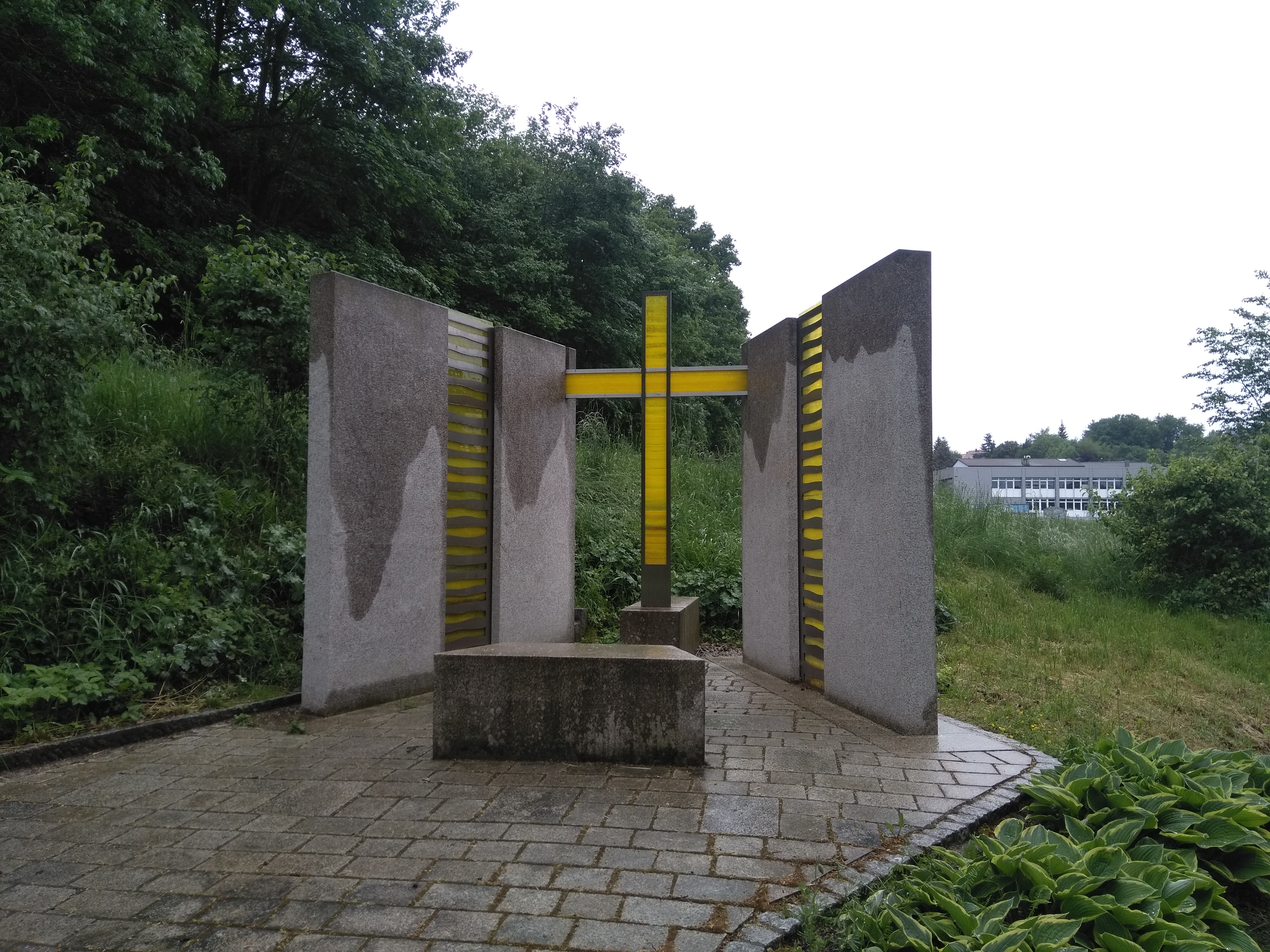 Radwegekapelle Insel der Ruhe, Erbendorf